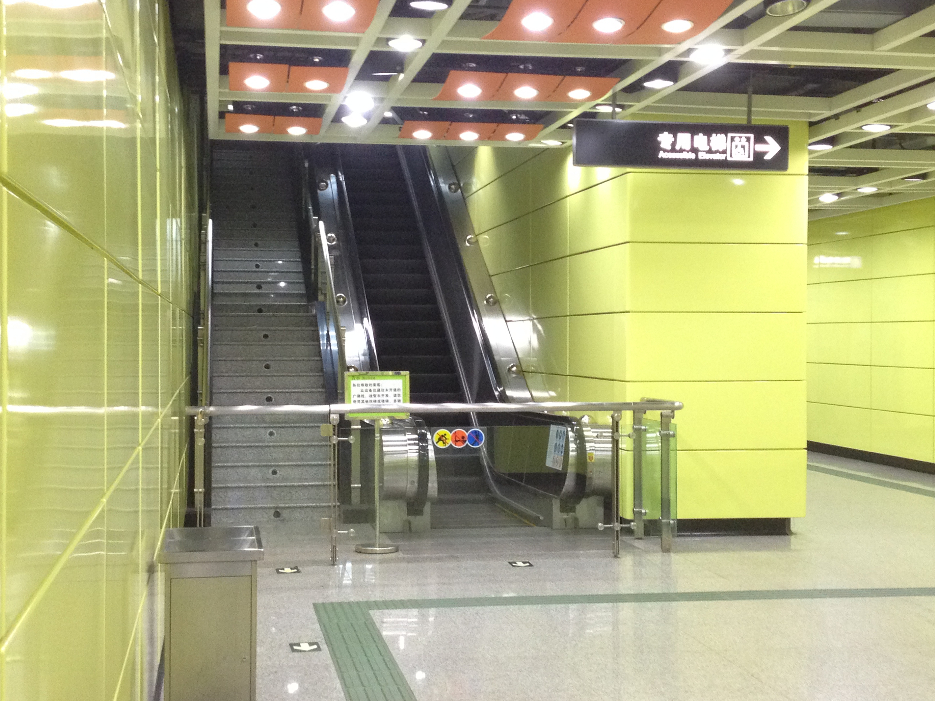 广州地铁沥滘站月台部分预留广佛线换乘通道